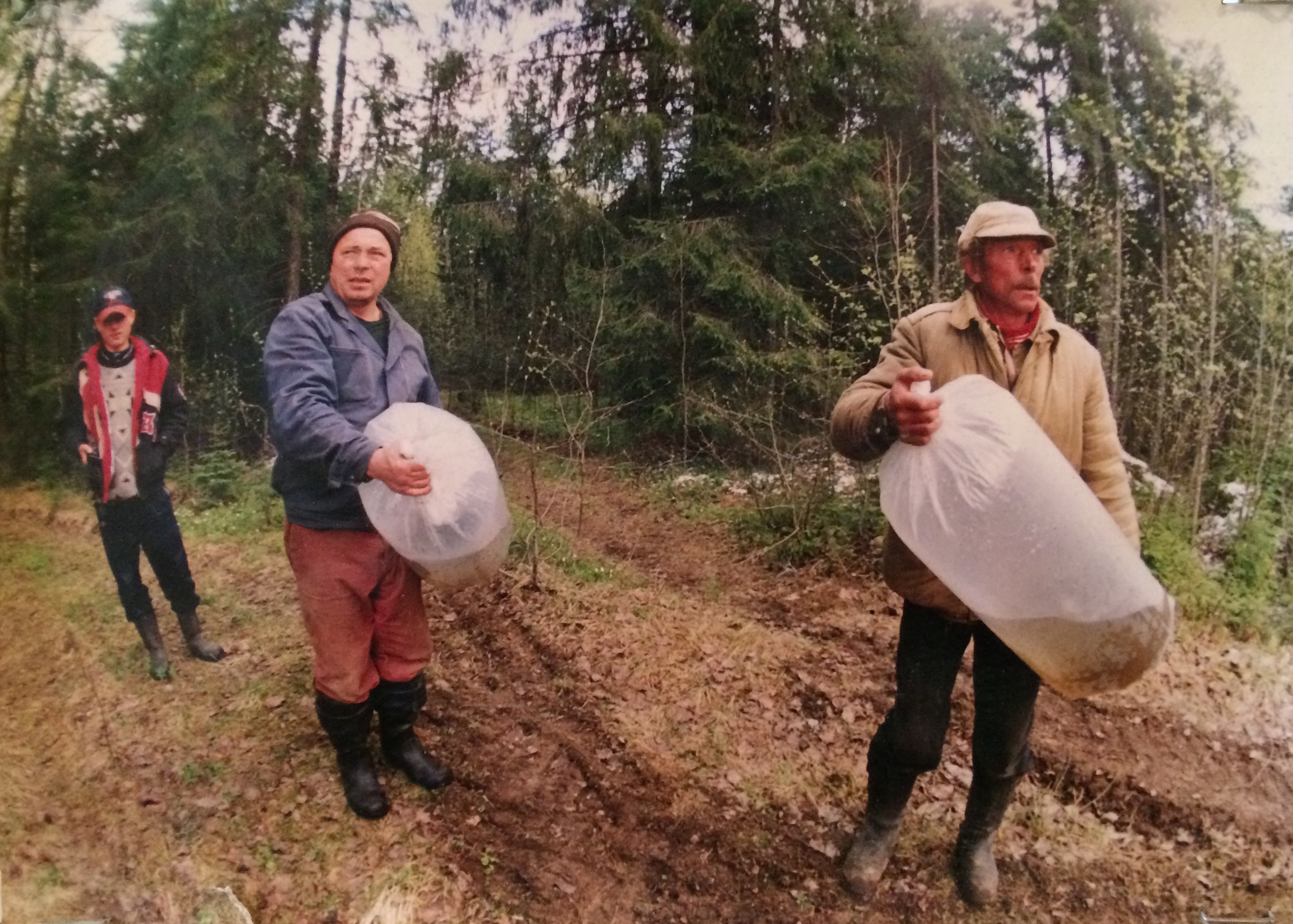 В баллоны при транспортировке накачивают кислород, чтобы мальки не погибли